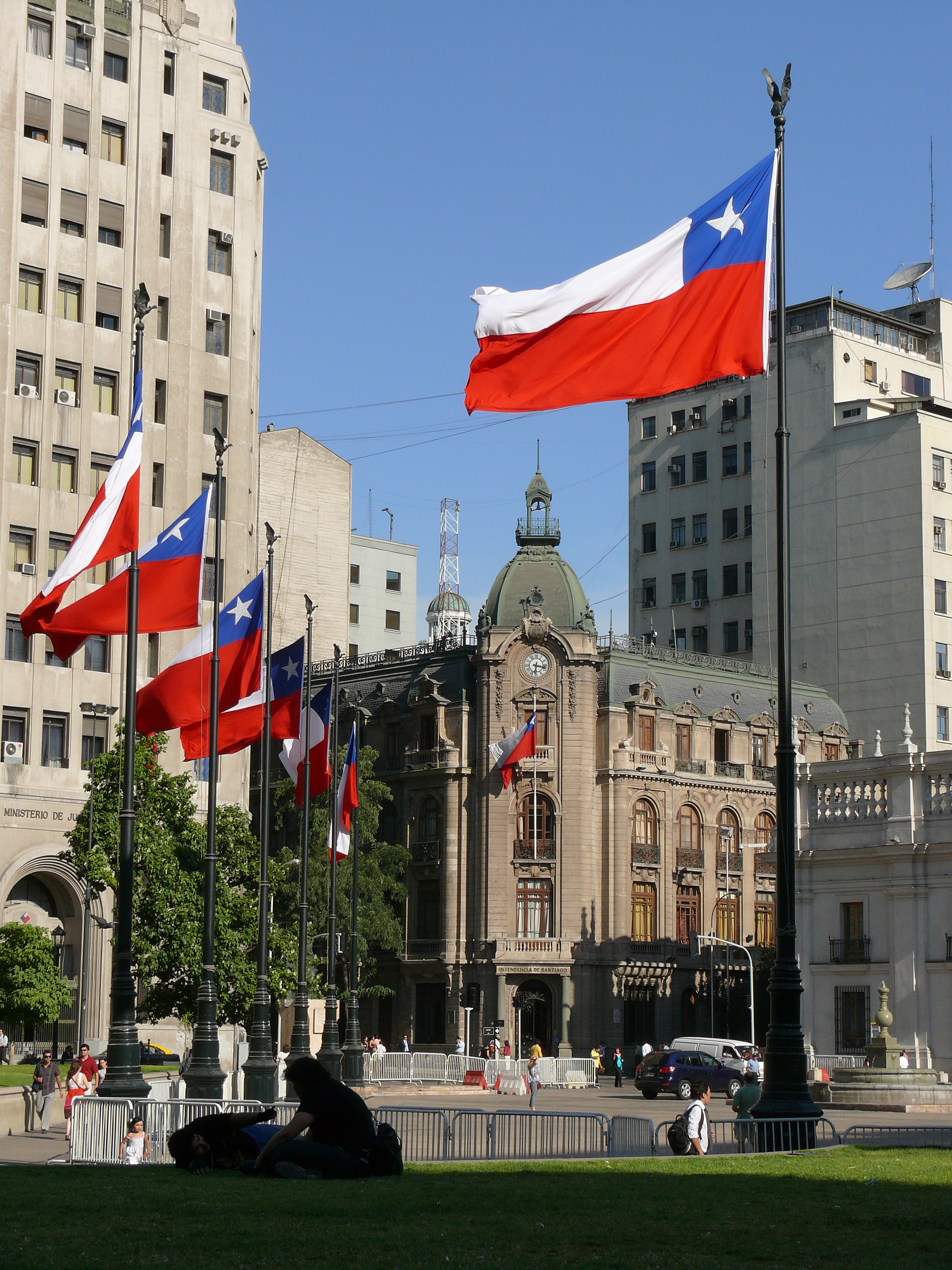 Vista de la Intendencia de Santiago desde la plaza This is a photo of a national monument in Chile: 232